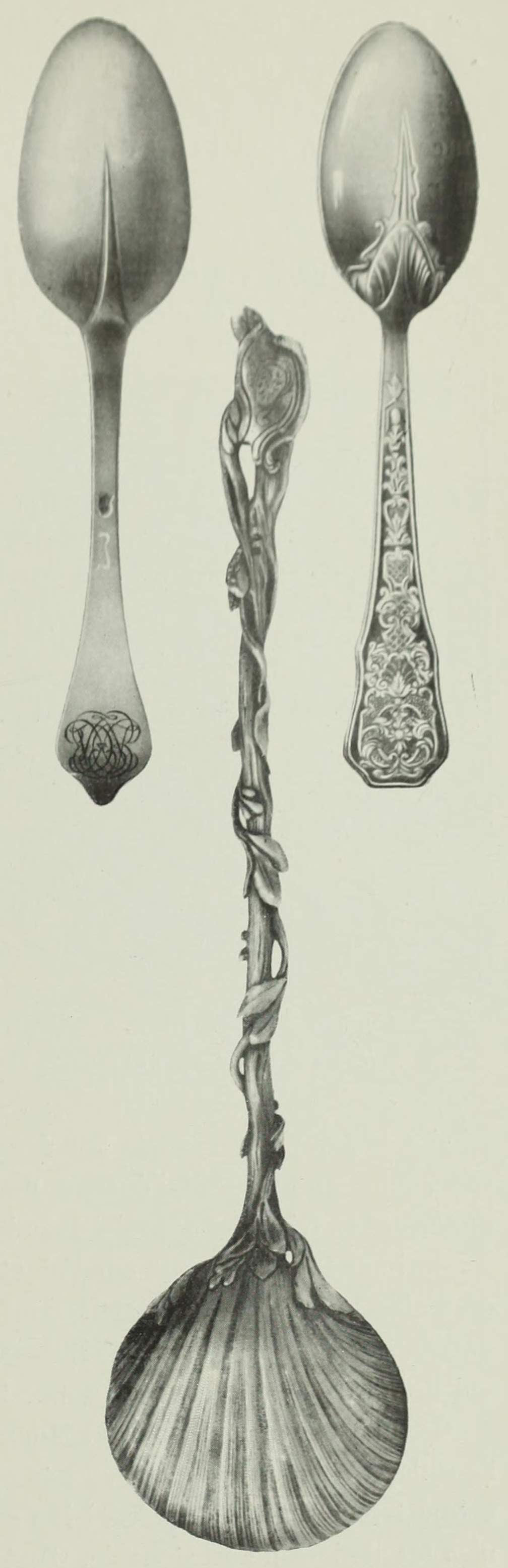 L'orfèvrerie française aux XVIIIe et XIXe siècles, p. 313